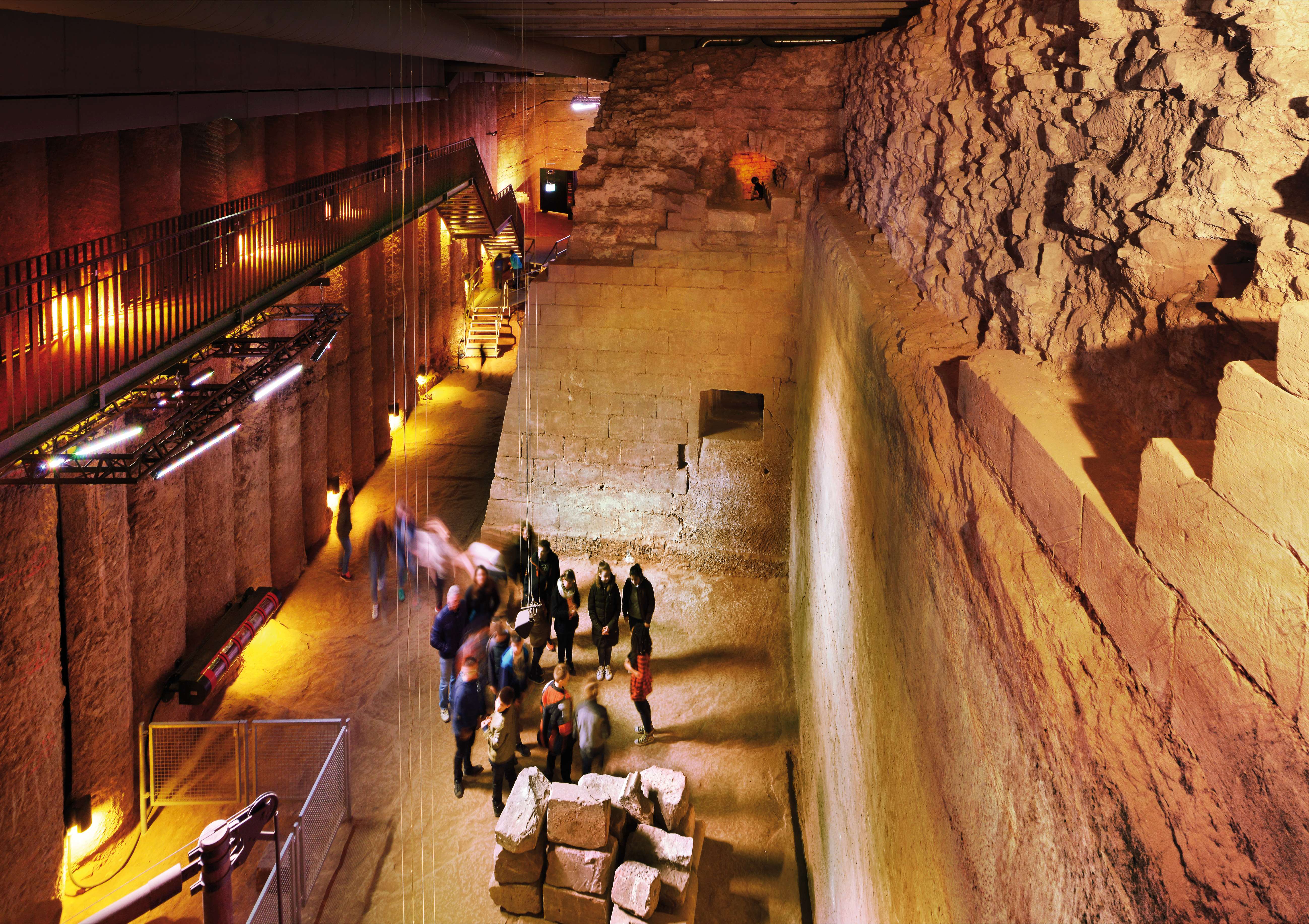 Blick in die unterirdische Burg